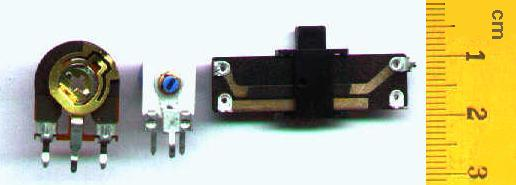 V.l.n.r.: Zwei Trimmpotentiometer und ein Schiebepotentiometer